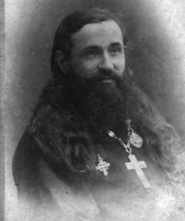 Профессор Александр Александрович Глаголев, эксперт на процессе Бейлиса Professor Аlexandr Alexandrovich Glagolev, expert in the Beilis Trial